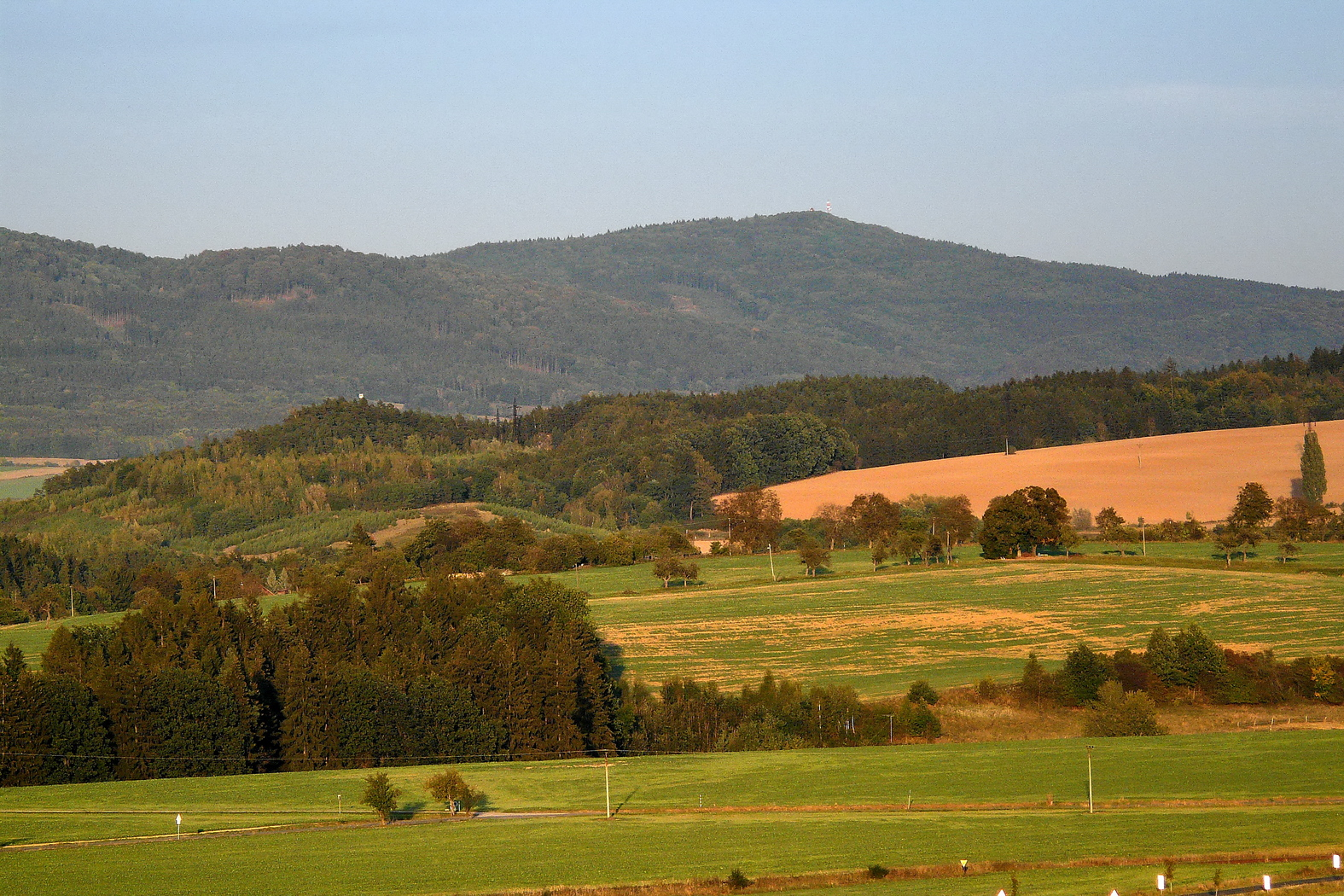 Hora Tábor od Stéblovic